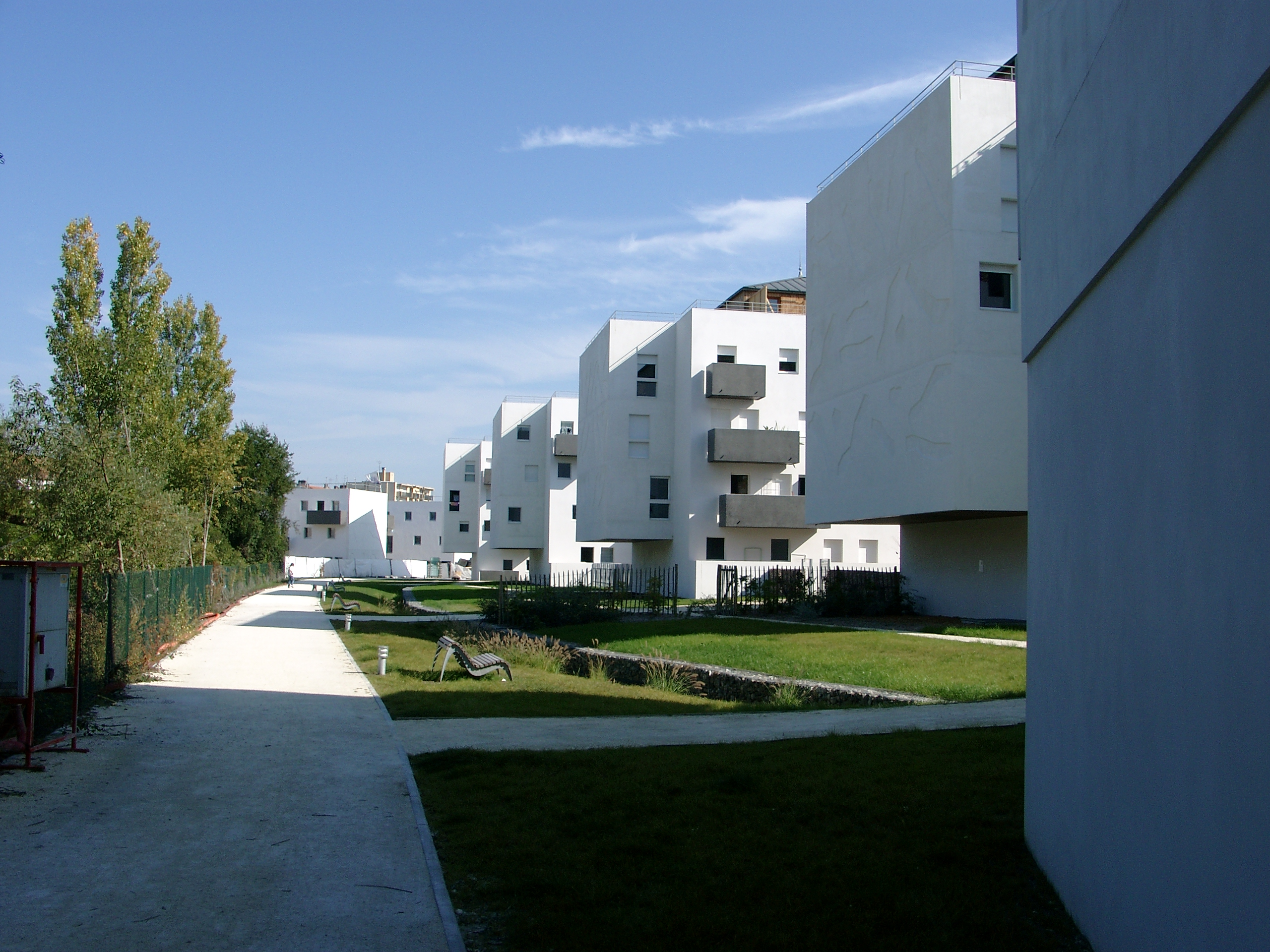 Parc Divona, côté jardins, Mérignac (Gironde). Architecte : Rudy Ricciotti